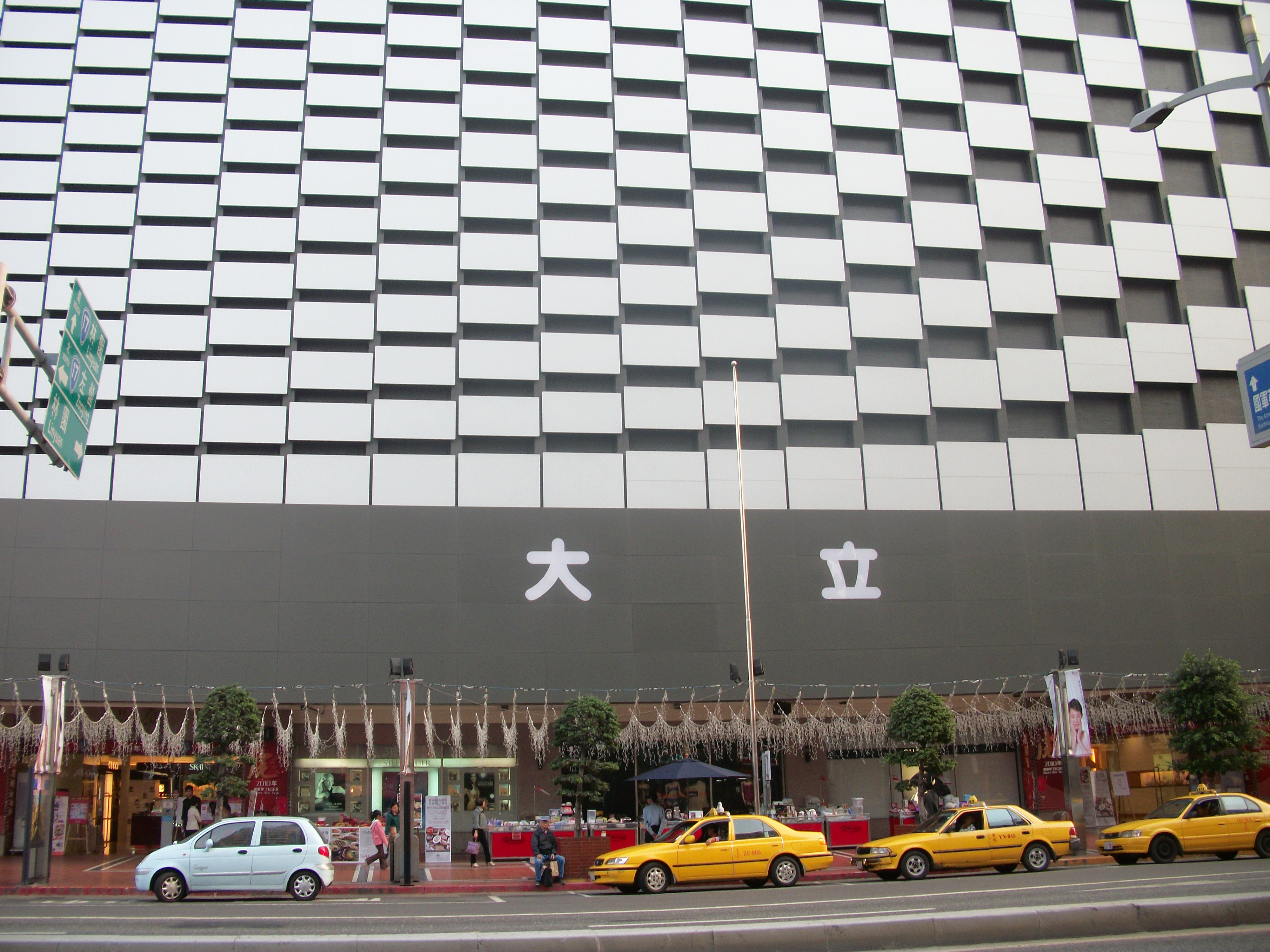 中文（台灣）: 高雄市大立百貨